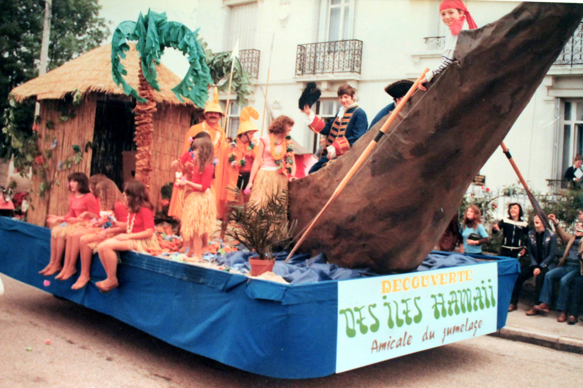 Fête des Myrtilles de Bruyères, édition 1977, char de l'association du jumelage Honululu-Bruyères.